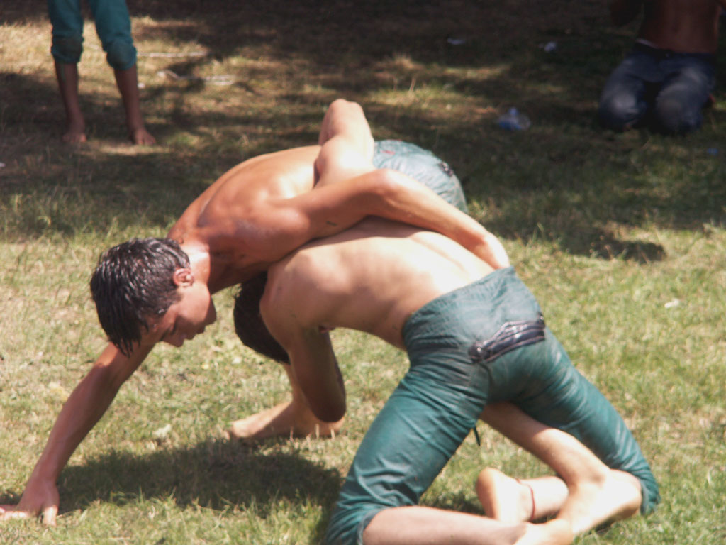 Yağlı güreş tournement in Istanbul on 6th August 2006.